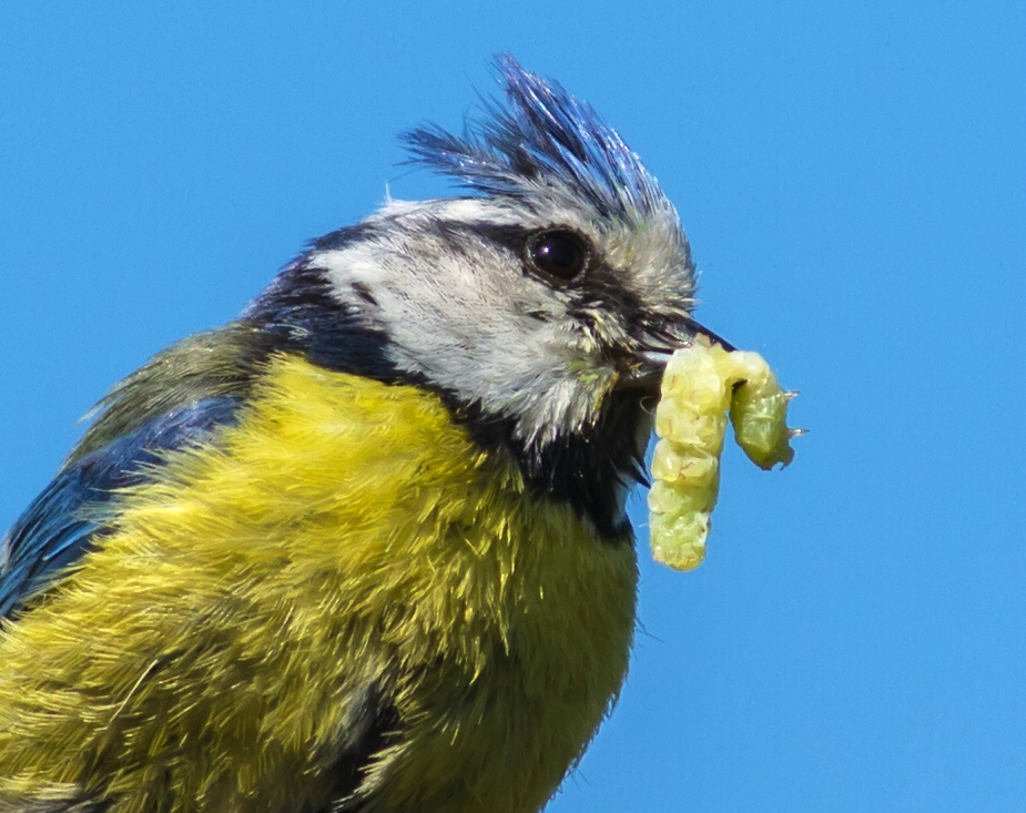 Blaumeise, Sachsen